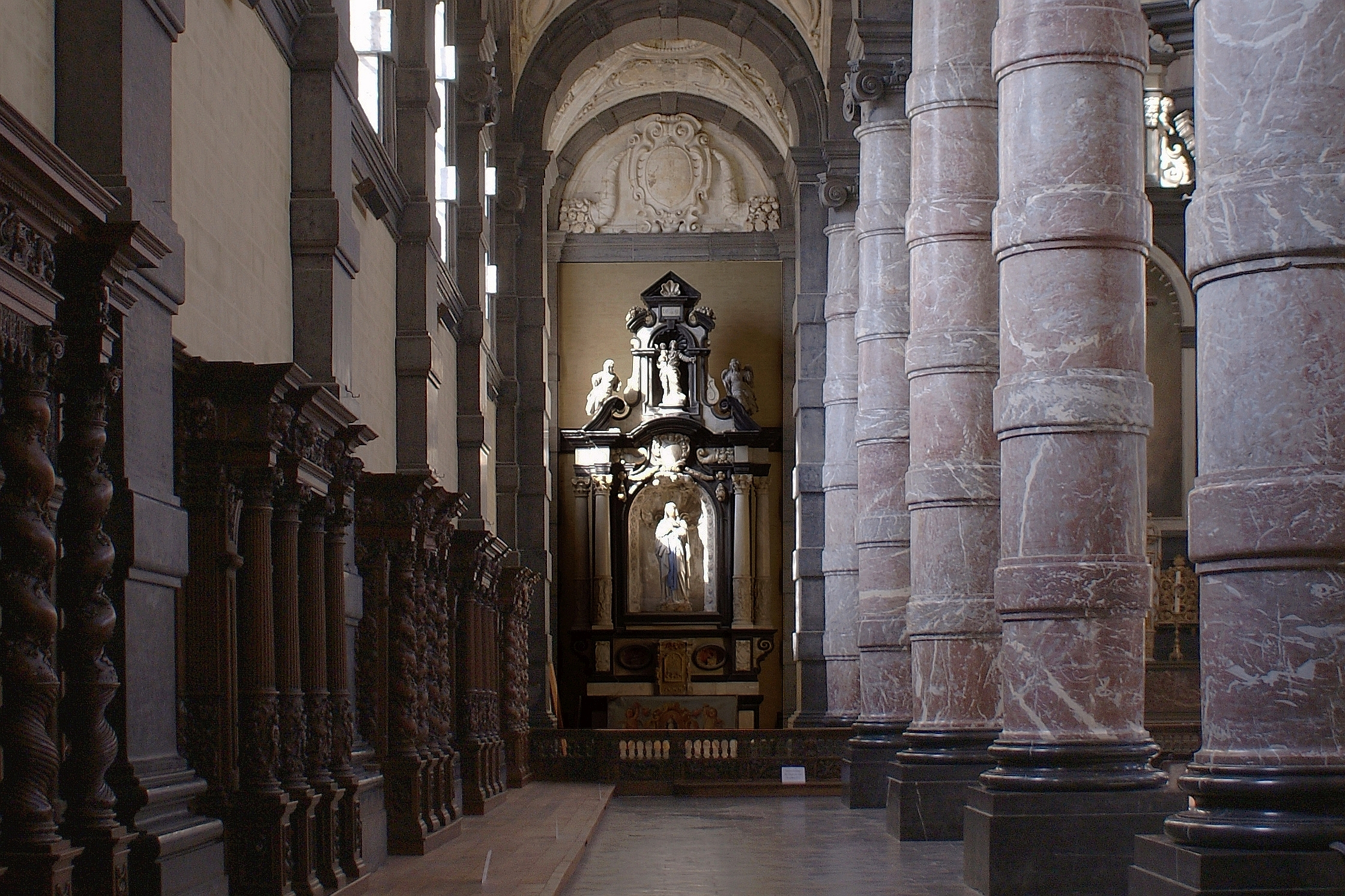 Eglise Saint Loup (Namur) - Nef latérale gauche; Saint-Loupkerk (Namen) - Linkerzijbeuk